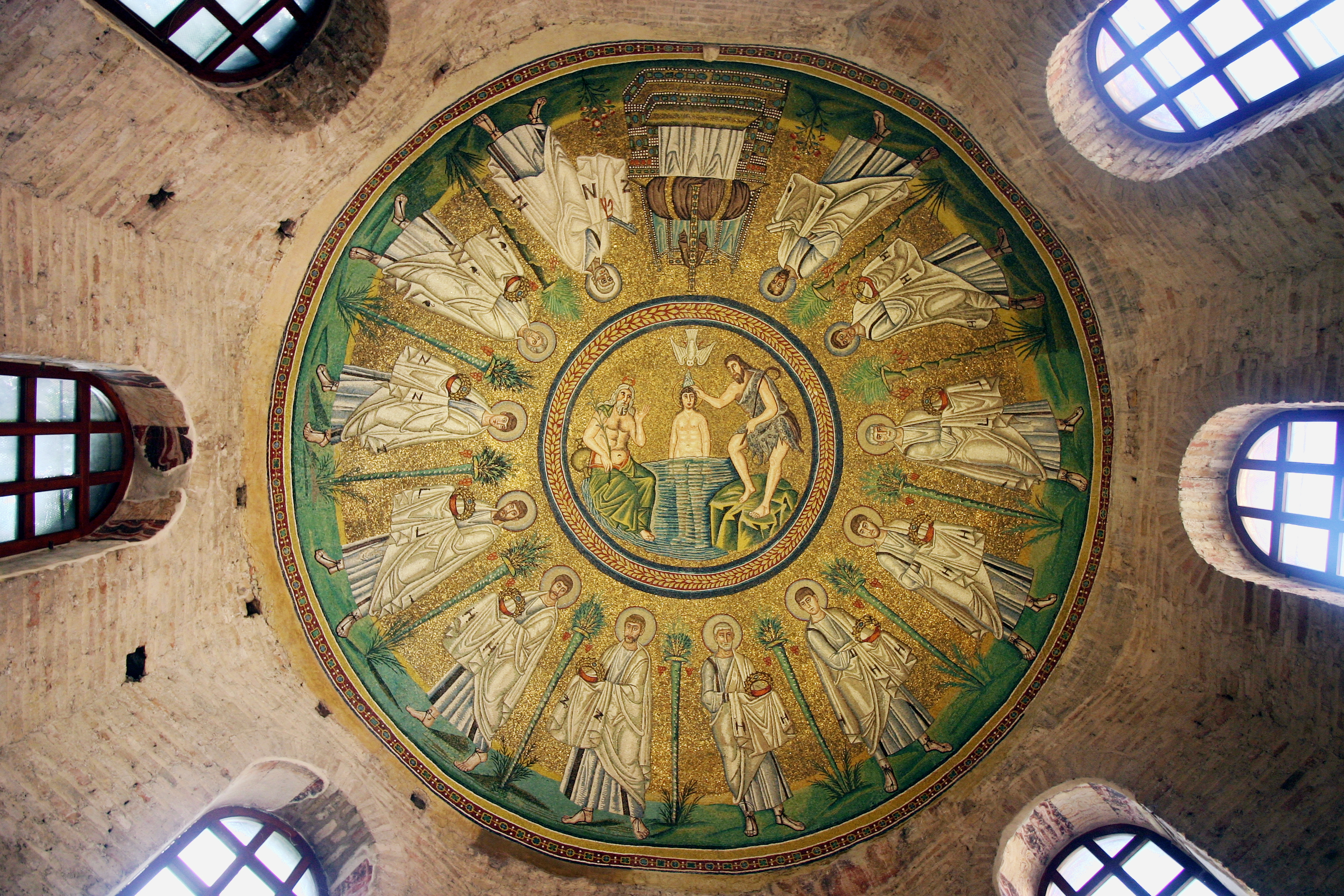 Arian Baptistry - Ravenna